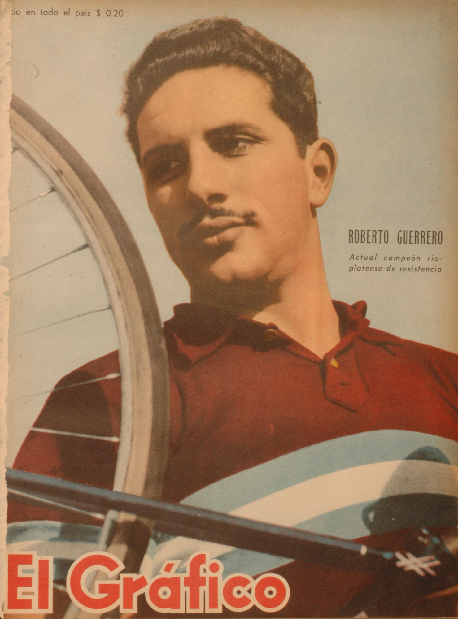 El Grafico del 10 de Agosto de 1945. Edicion 1361